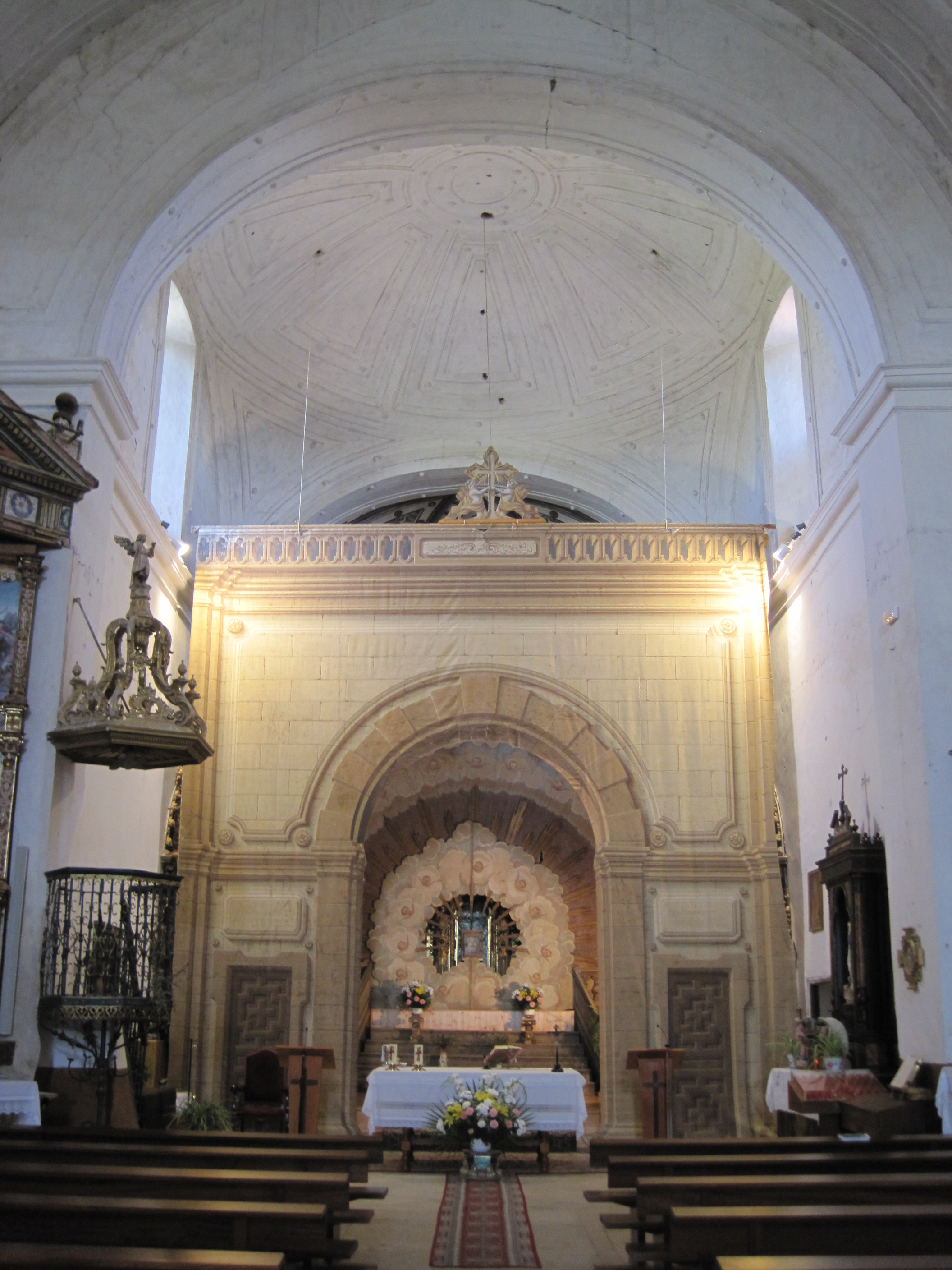 Monumento de Semana Santa, instalado en la iglesia de Ventosa de la Cuesta (Valladolid, España).